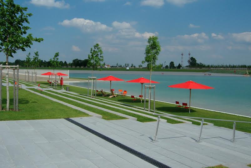 Riemer Park - autour du lac